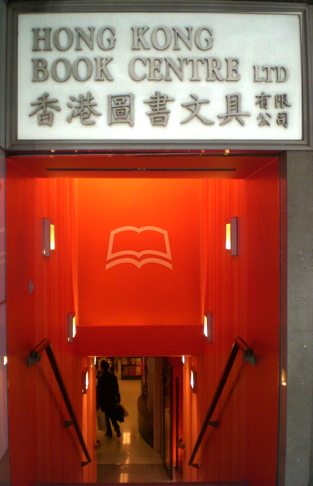 辰衝書店屬下的香港圖書文具有限公司, Hong Kong Book Centre, 安樂園大廈地庫, 中環德輔道中25號, Des Voeux Road Central, Central Hong Kong